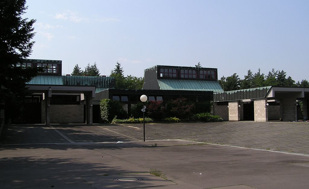 Krematorium Ruhleben in Berlin